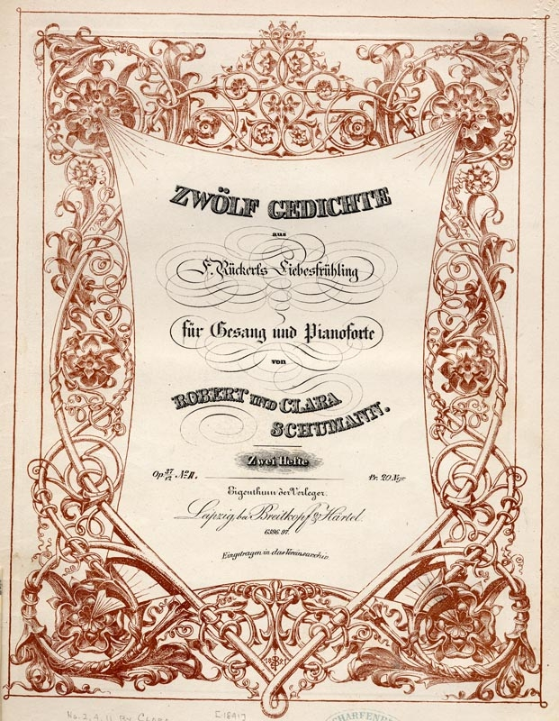 Titelblatt von Robert und Clara Schumanns Zwölf Gedichte aus Rückerts Liebesfrühling für Gesang und Pianoforte op. 37 / op. 12